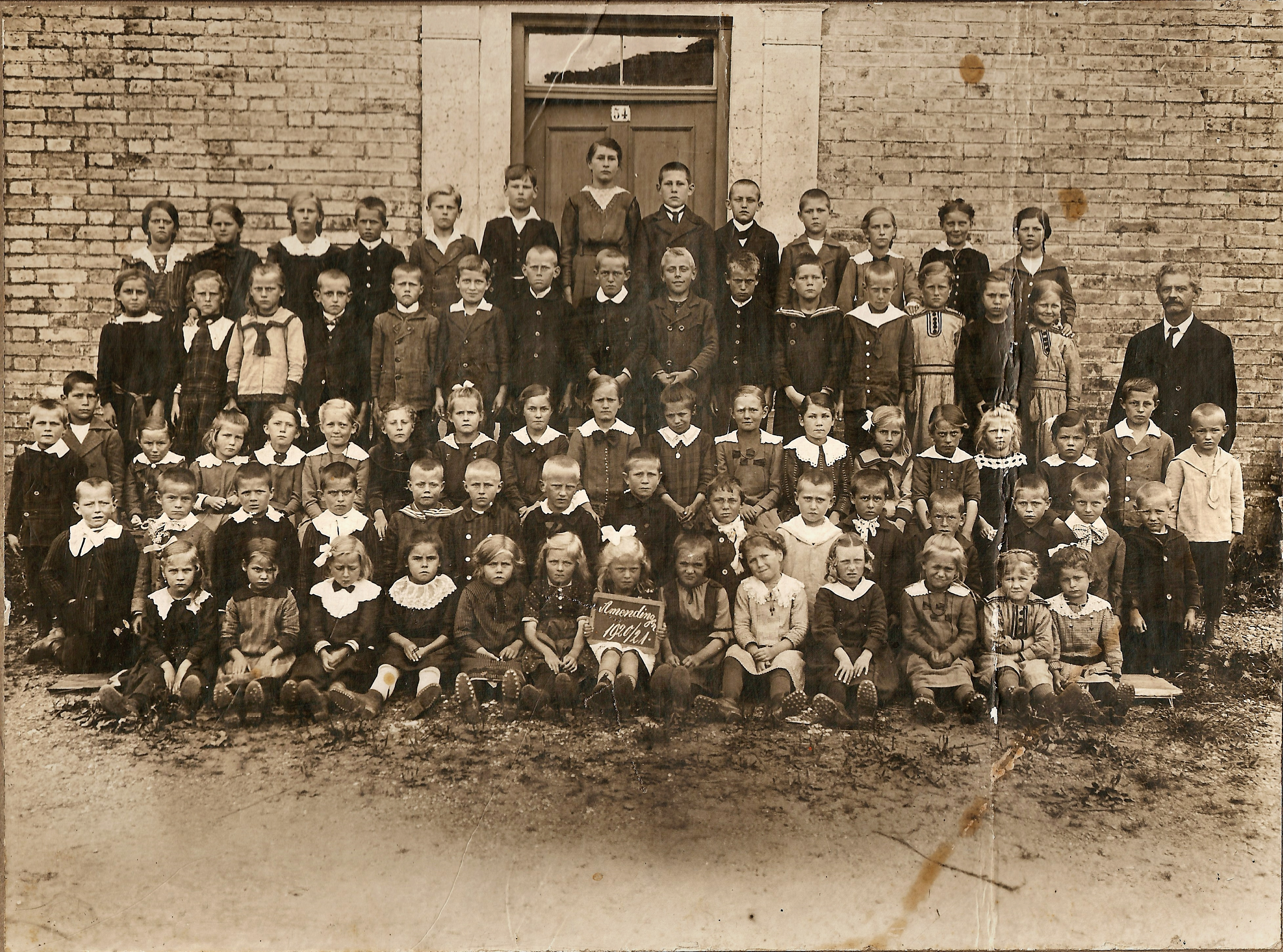 Klassenfoto vor der Volksschule Amendingen vom Jahrgang 1920/21